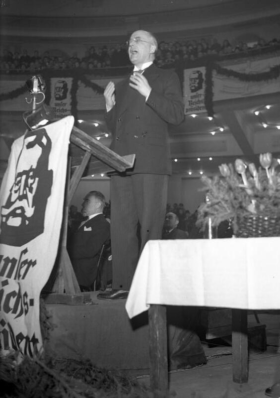 Reichskanzler Dr. Brüning spricht im überfüllten Sportpalast vor 20.000 Zuhörern für die Wiederwahl des Reichspräsidenten von Hindenburg ! Reichskanzler Dr. Brüning am Rednerpult spricht zu den Massen.